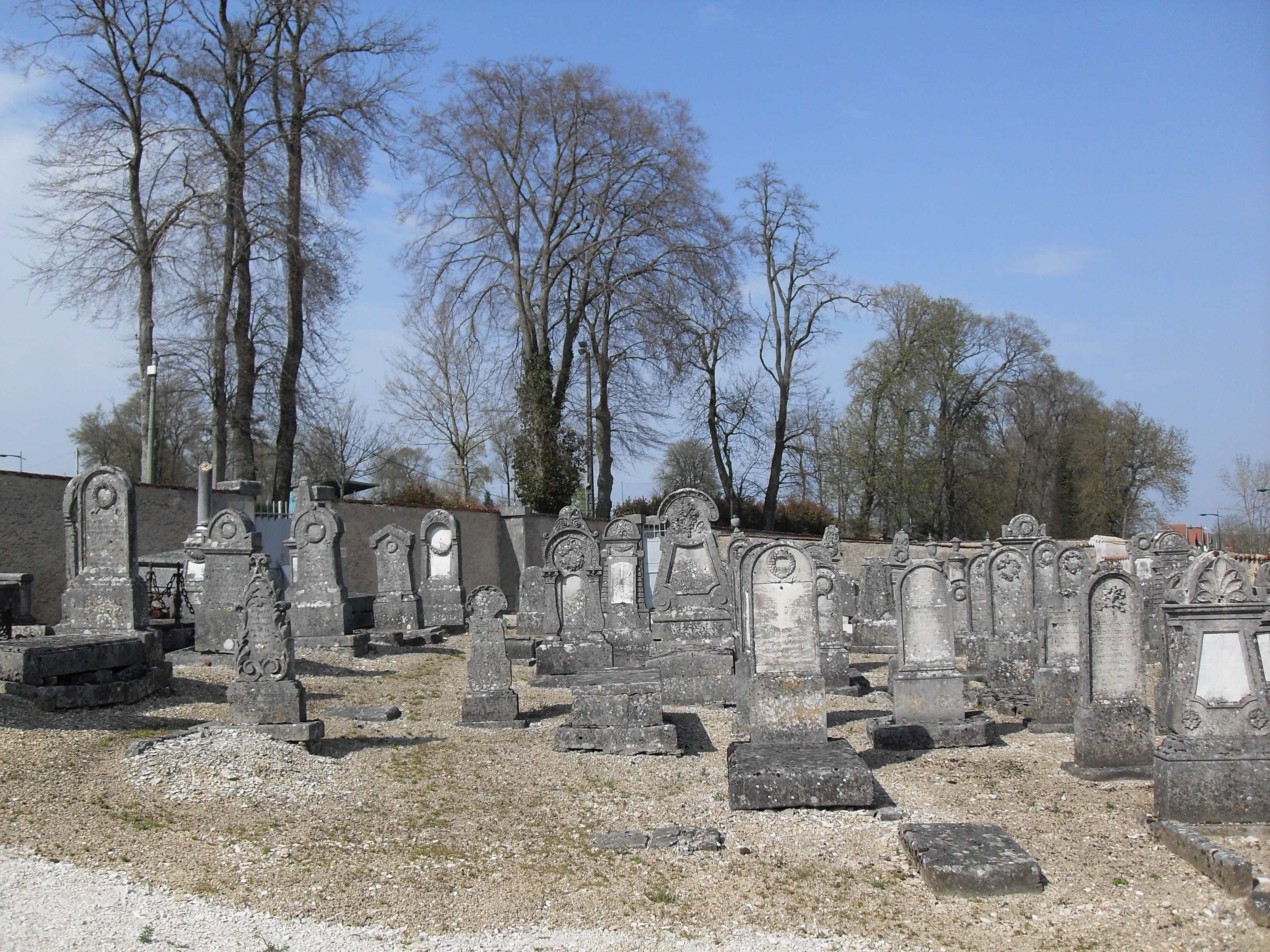 Cimetière Israélite de Vaucouleurs Meuse (55)